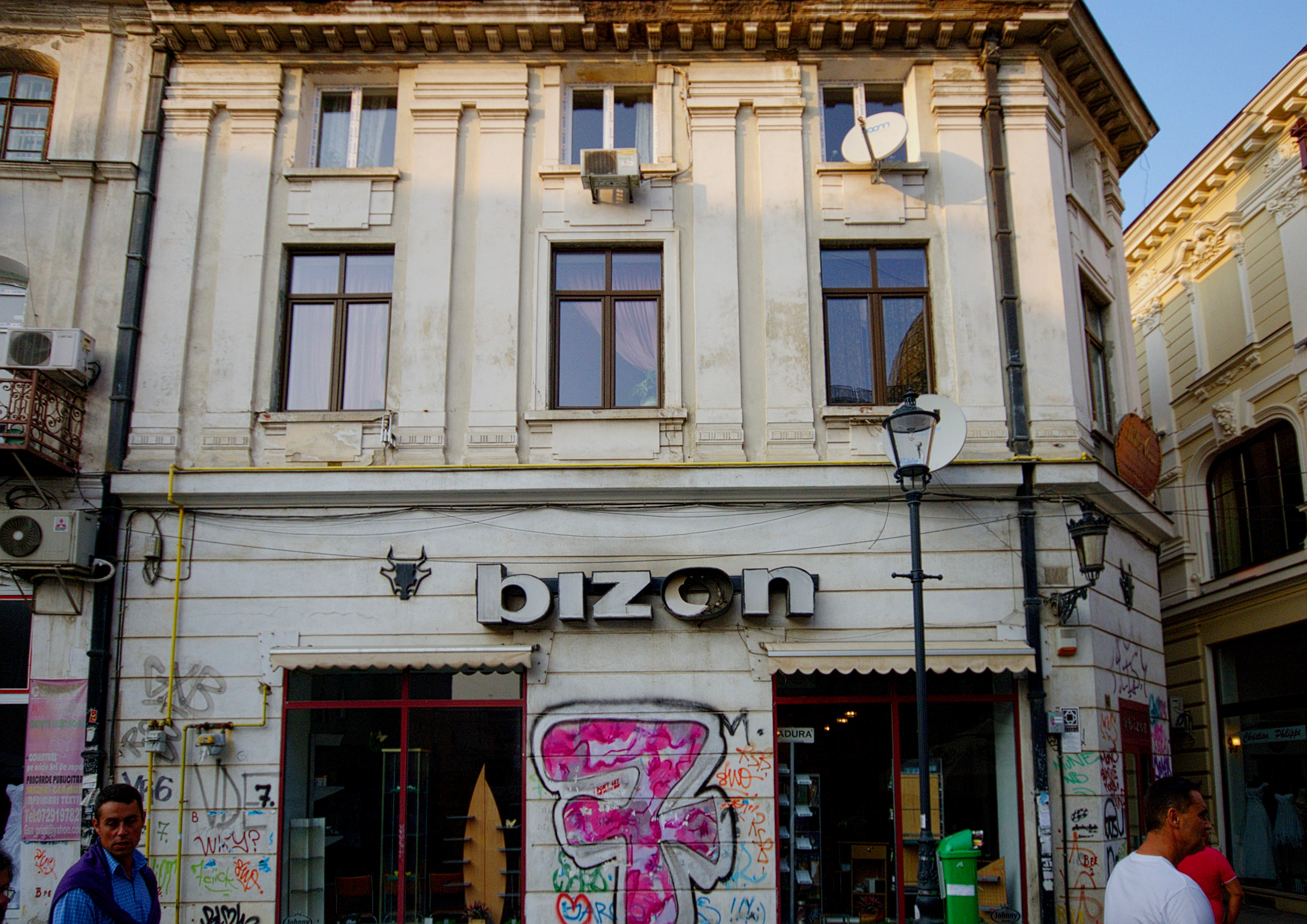 Casă cu prăvălie, Lipscani 41